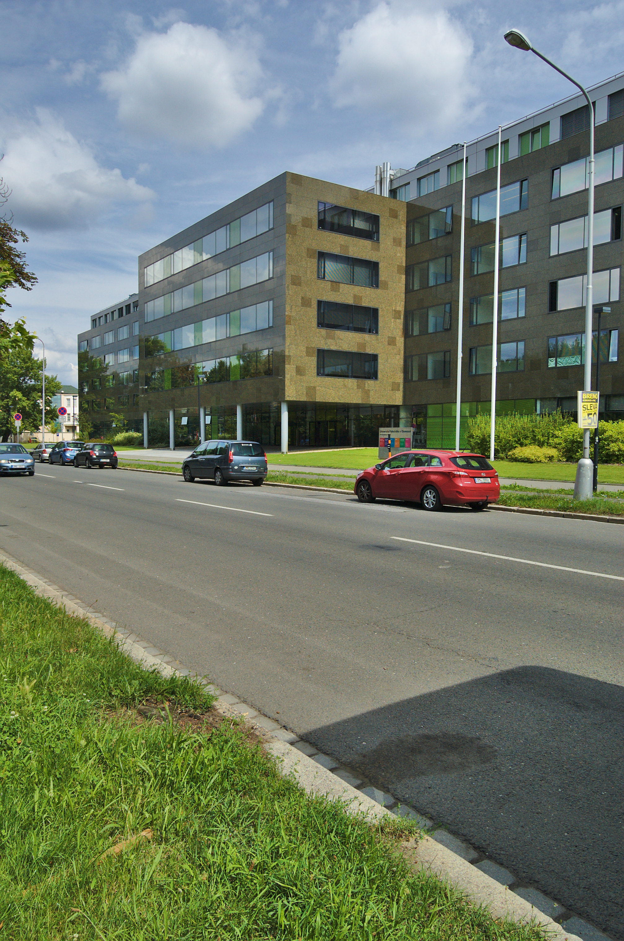 Přírodovědecká fakulta - nová budova, Olomouc